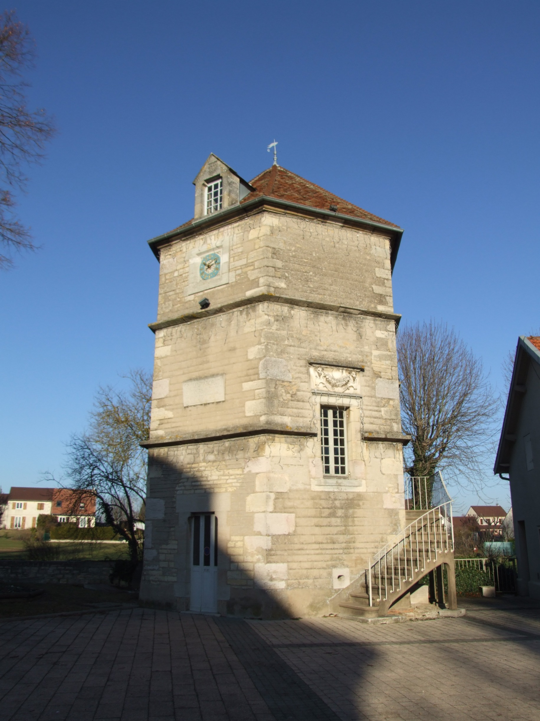 Mairie de Saint-Apollinaire, Saint-Apollinaire, Côte-d'Or, Bourgogne, FRANCE